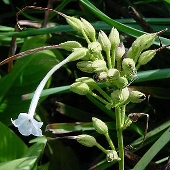 bloem van tabaksplant Nicotiana sylvestris (foto Wouter Hagens)